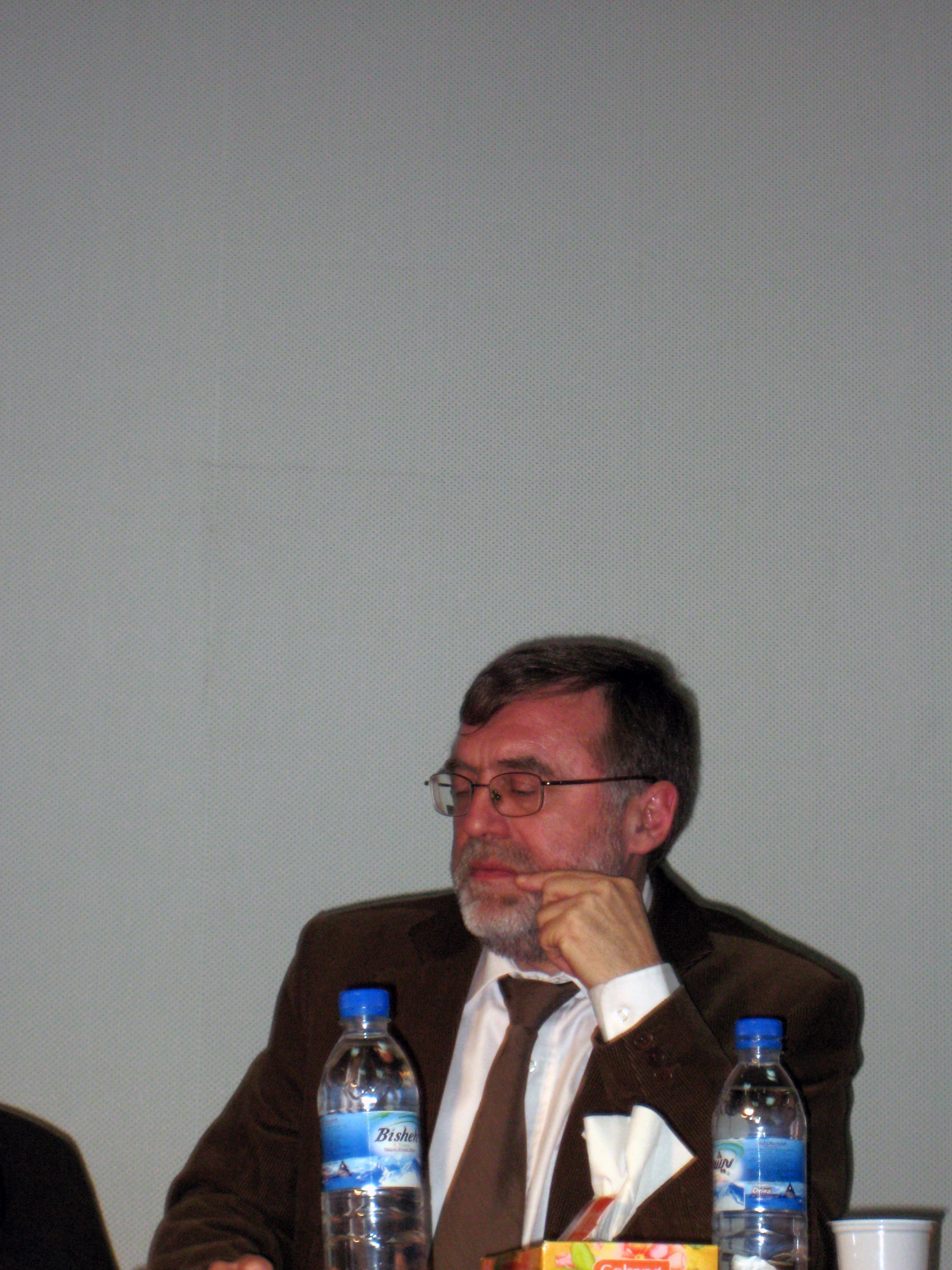 MATEI VISNIEC